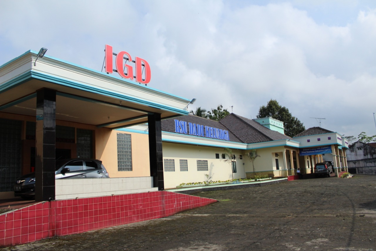 Foto bangunan utama RSU Dadi Keluarga Ciamis